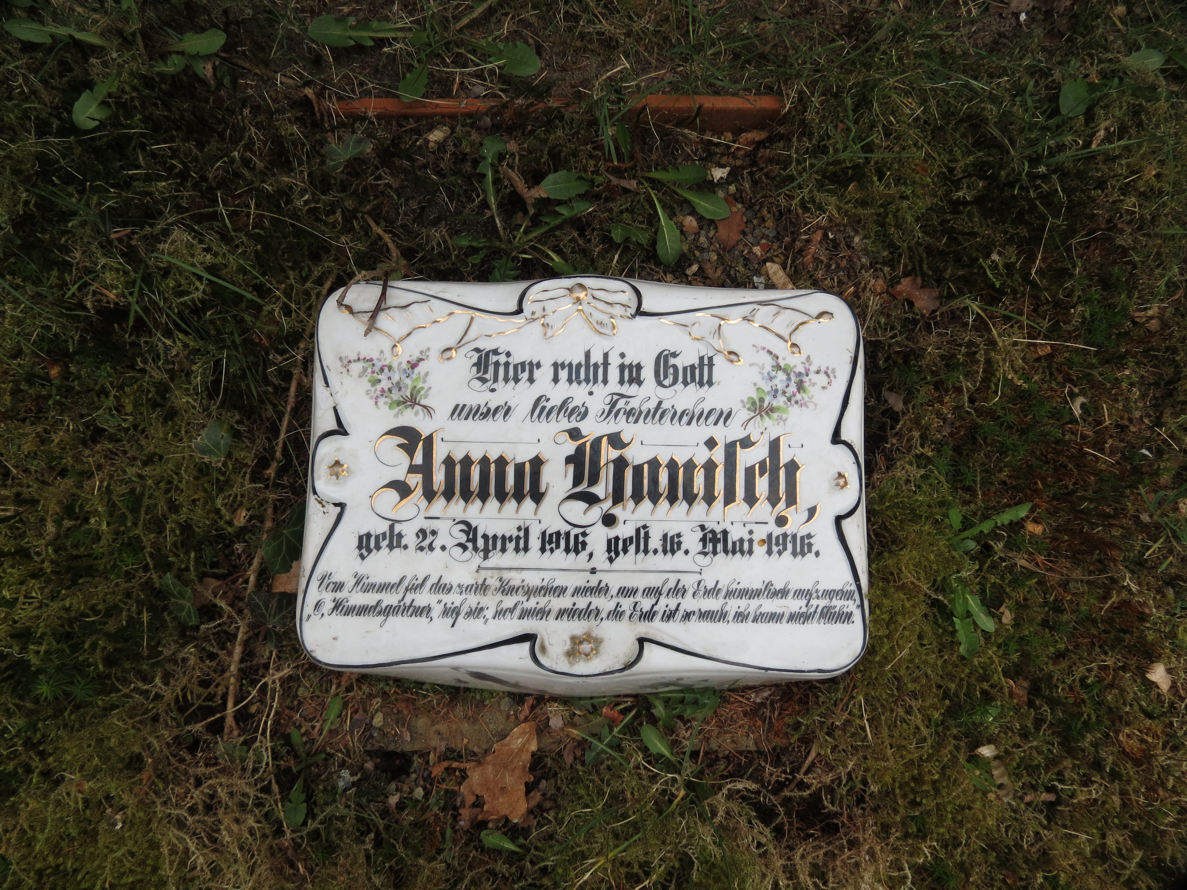 Waldfriedhof, Historisches Gräberfeld, Grabkissen eines Säuglinggrabes, Plattkow, Ortsteil der Gemeinde Märkische Heide, Landkreis Dahme-Spreewald, Brandenburg, Deutschland